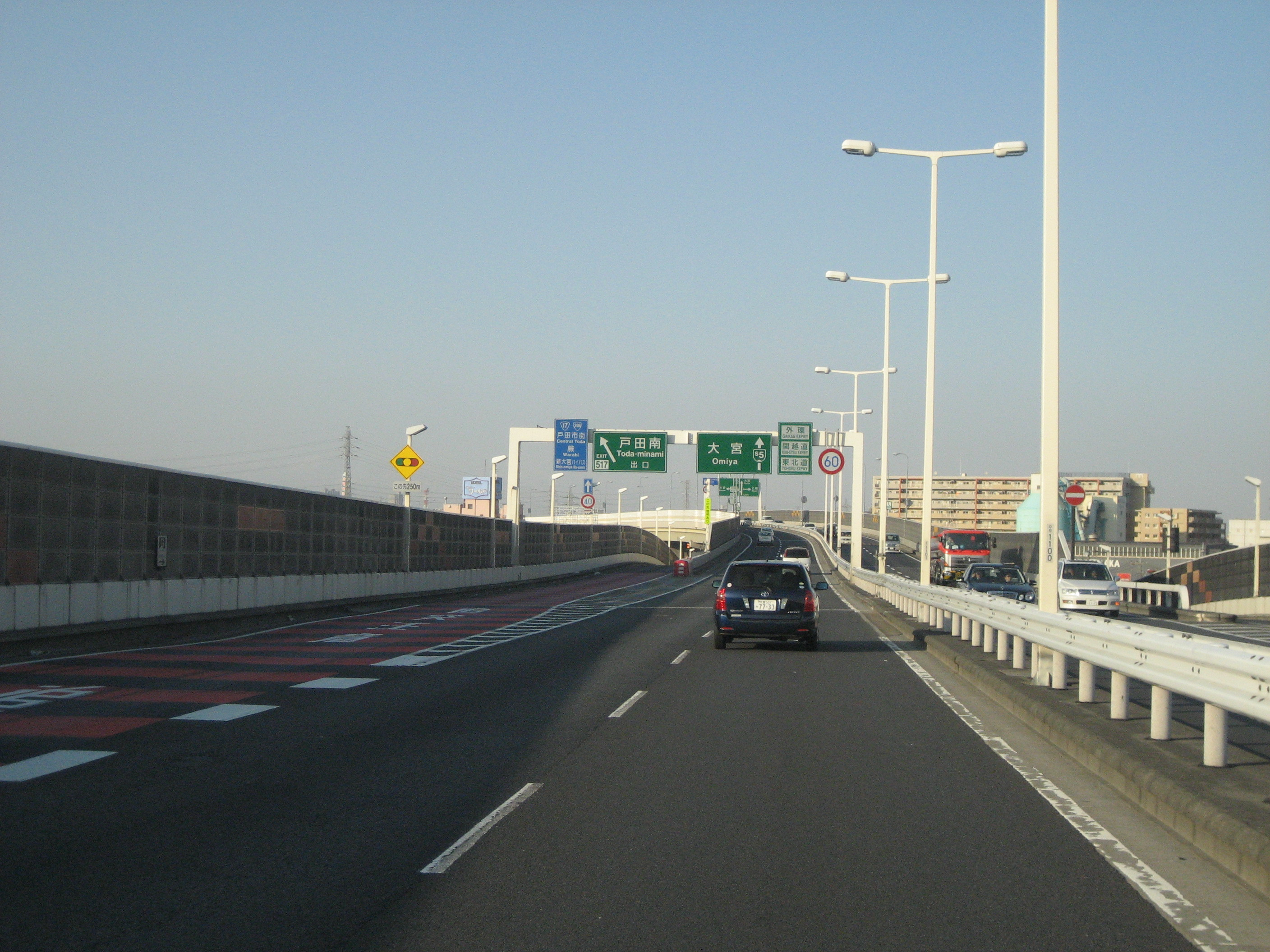 首都高速道路5号池袋線戸田南出入口付近